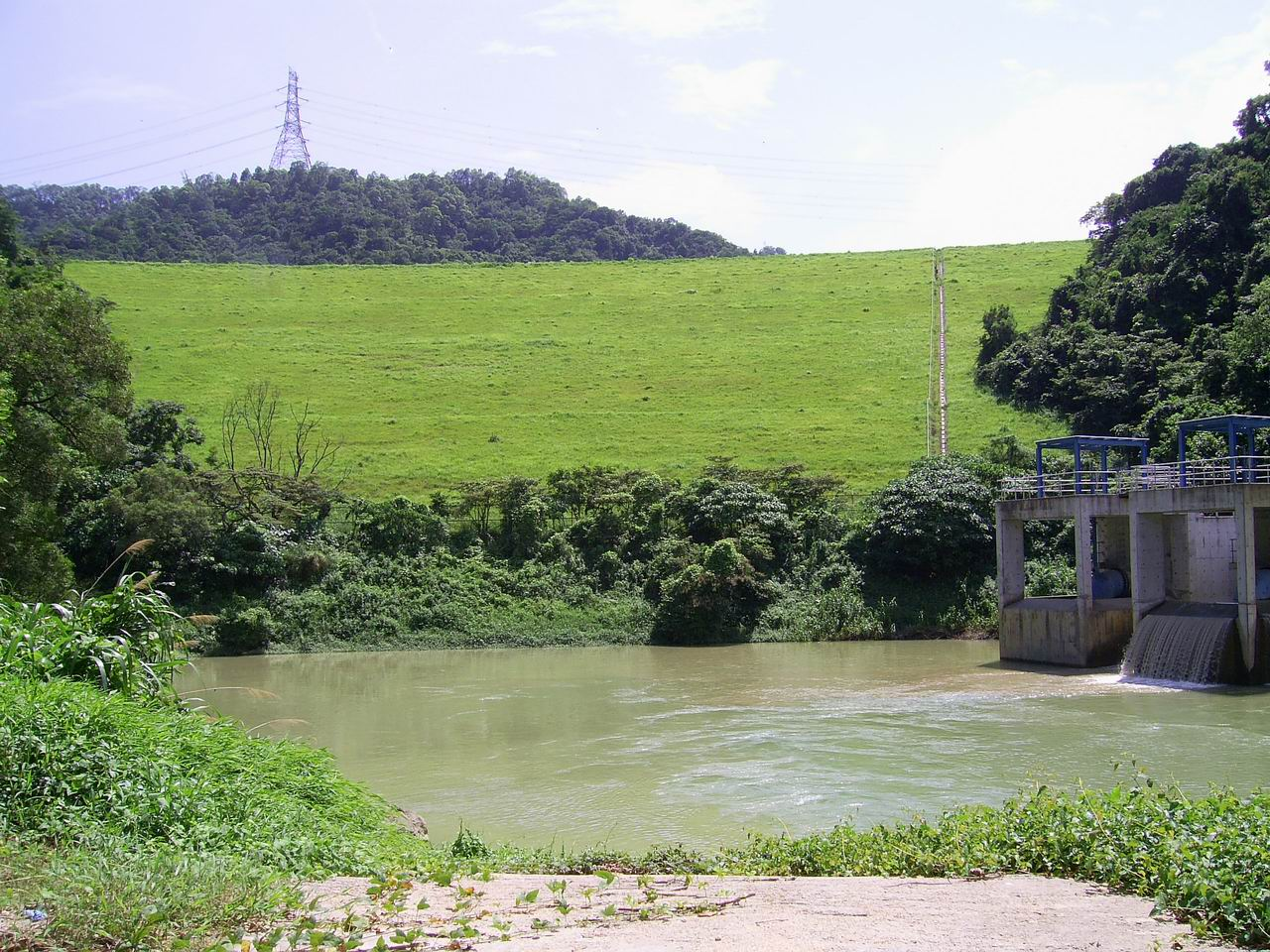 下城門水塘主壩及下方的供應塘